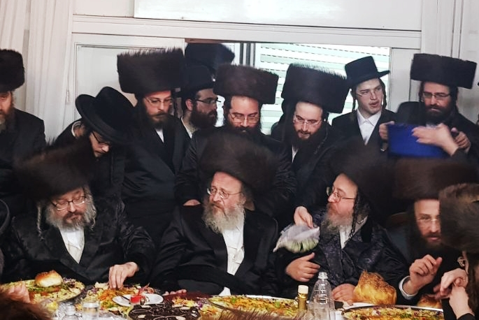 האחים האדמו"רים בני האדמו"ר רבי דוד מתתיהו מביאלא בהכנסת ספר תורה, י"ט שבט תשע"ח